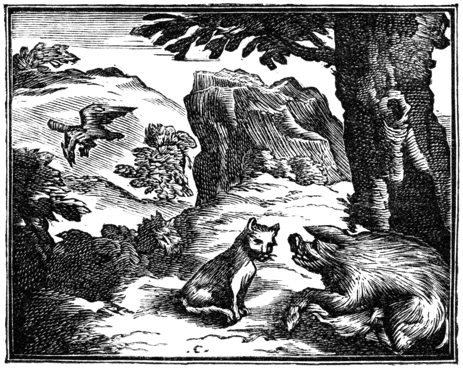 Illustrations pour les « Fables choisies mises en vers par M. de la Fontaine », Claude Barbin et Denys Thierry, Paris, 1668 (premier recueil) 1678-79 (deuxième recueil) 1694 (troisième recueil). Numérotation Charpentier (1705).